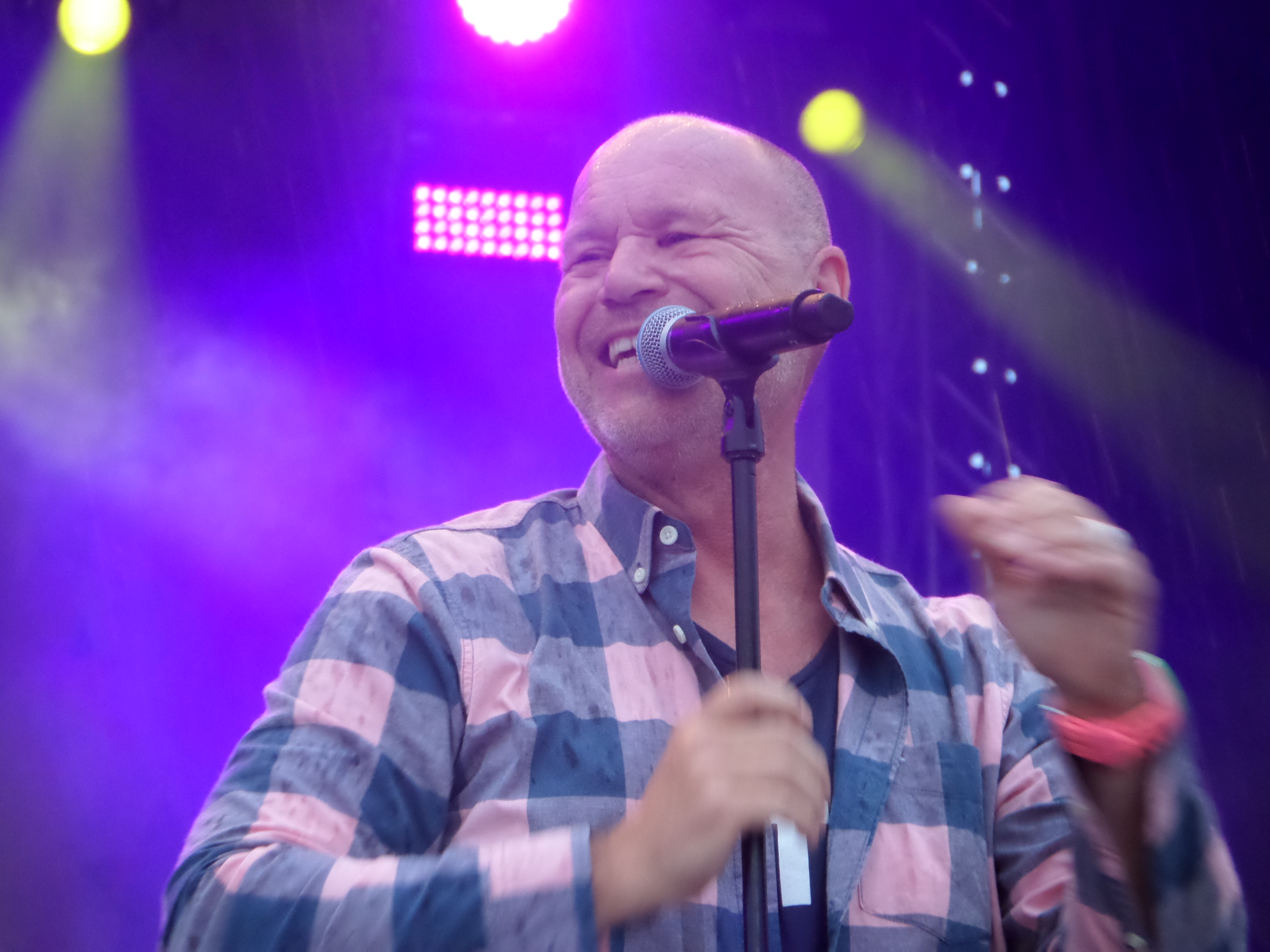 Olaf Henning beim Auftritt bei Bremen Ole (2019)